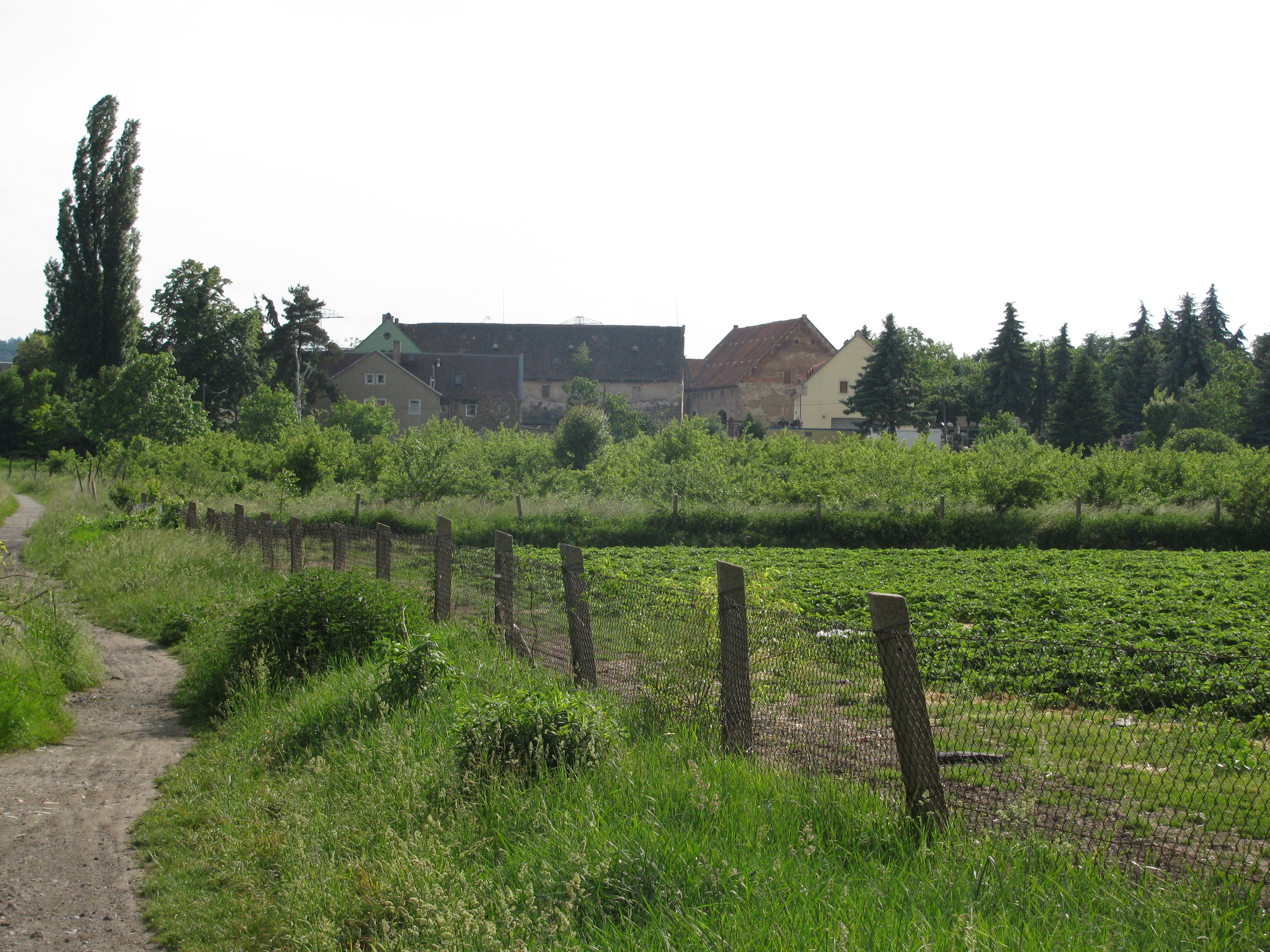 Blick von Meußlitz über die Wiesen des alten Elbarms nach Altsporbitz